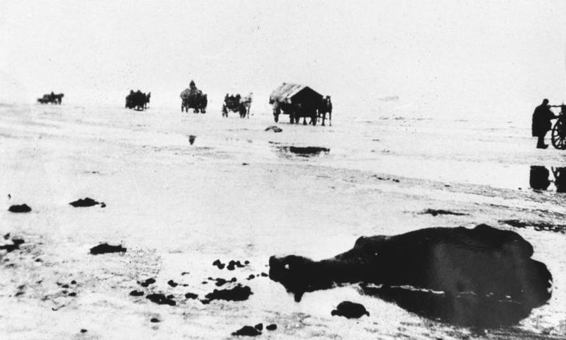 Flüchtlingstreck Ostpreussische Bauern, die versuchen über das Kurische Haff vor dem russischen Einmarsch im Jahre 1945 auszuweichen und über die Kurische Nehrung bisher unbesetztes Gebiet zu erreichen.